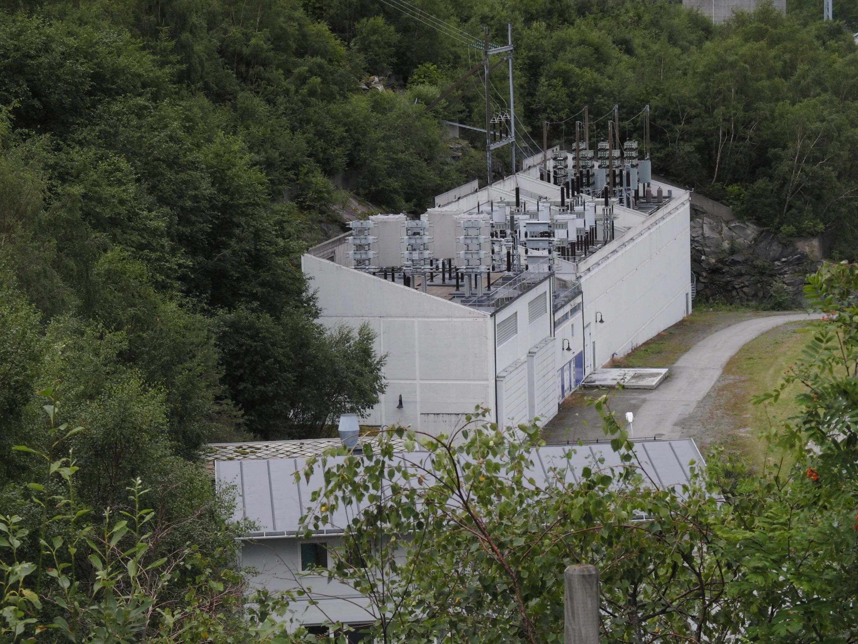 Holsbru kraftverk, nettstasjonen ved inngangsportalen.